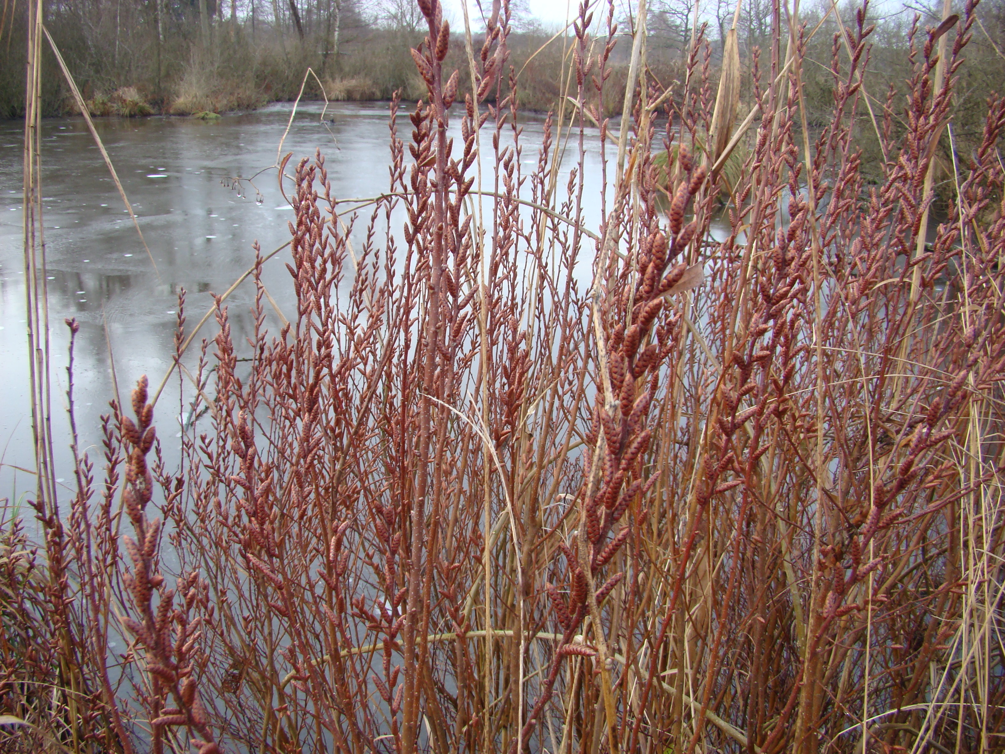 Gagelstrauch am Teichufer The endangered plant species, Myrica gale, on the banks of a pond at Meißendorf Lakes, Lower Saxony, Germany.